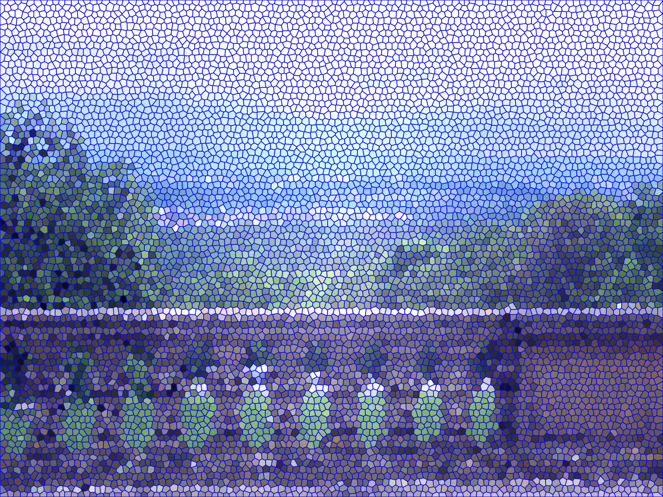 Buntglasfilter